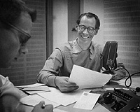 C-G Hammalund